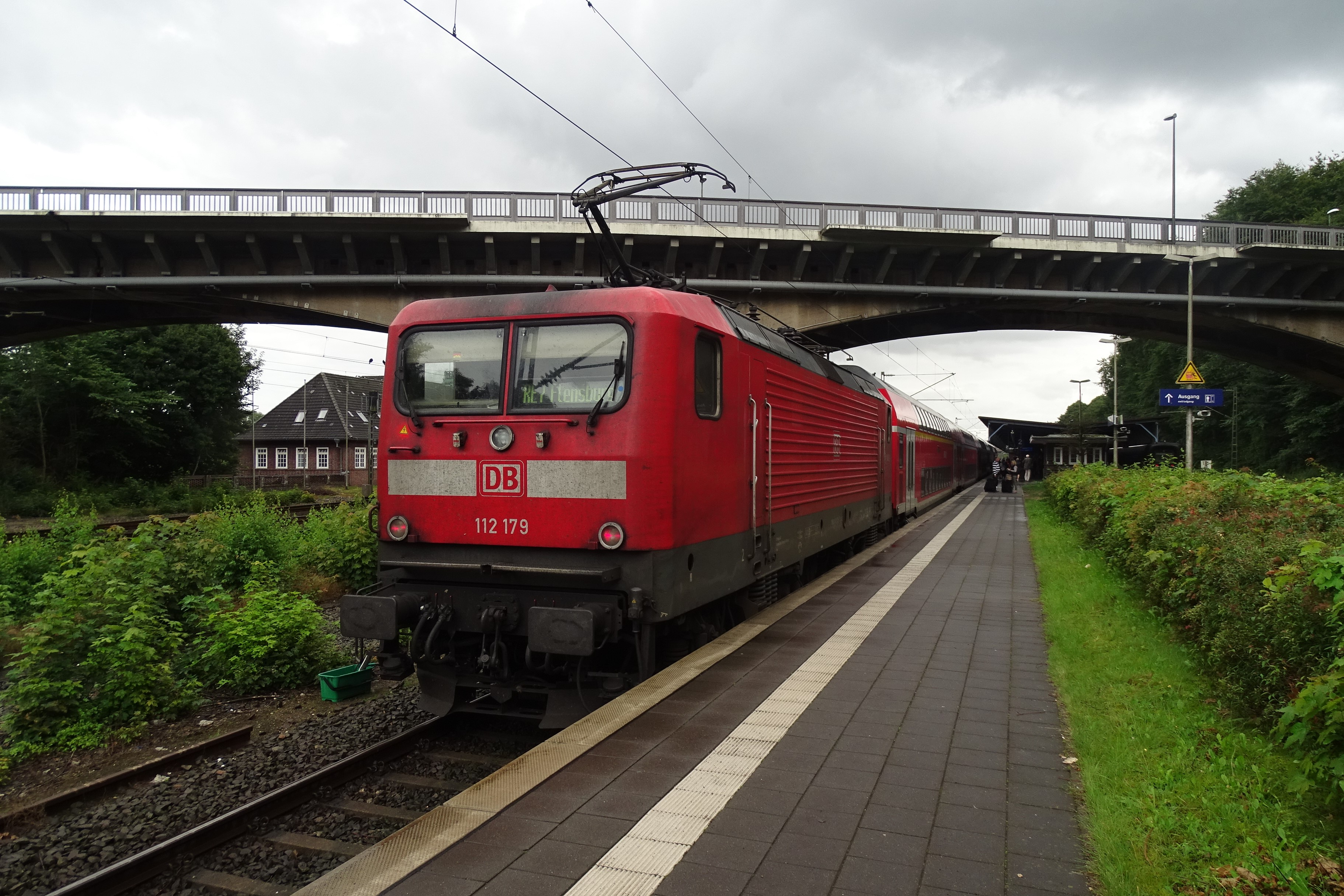 Ein RE7 nach Hamburg Hbf steht in Flensburg bereit